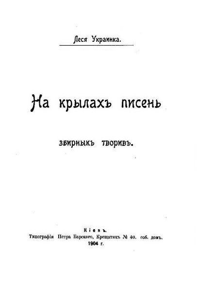 Титульний аркуш видання: Леся Украинка. На крылахъ писень. Киевъ, 1904.